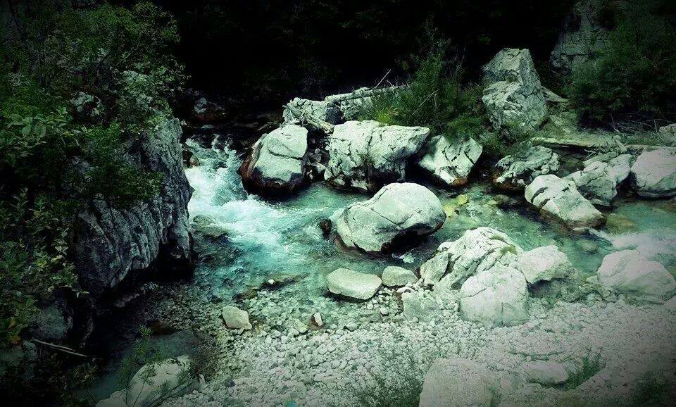 Pasteritia dhe bukuria ne lumin e Valbones nuk kane kufij